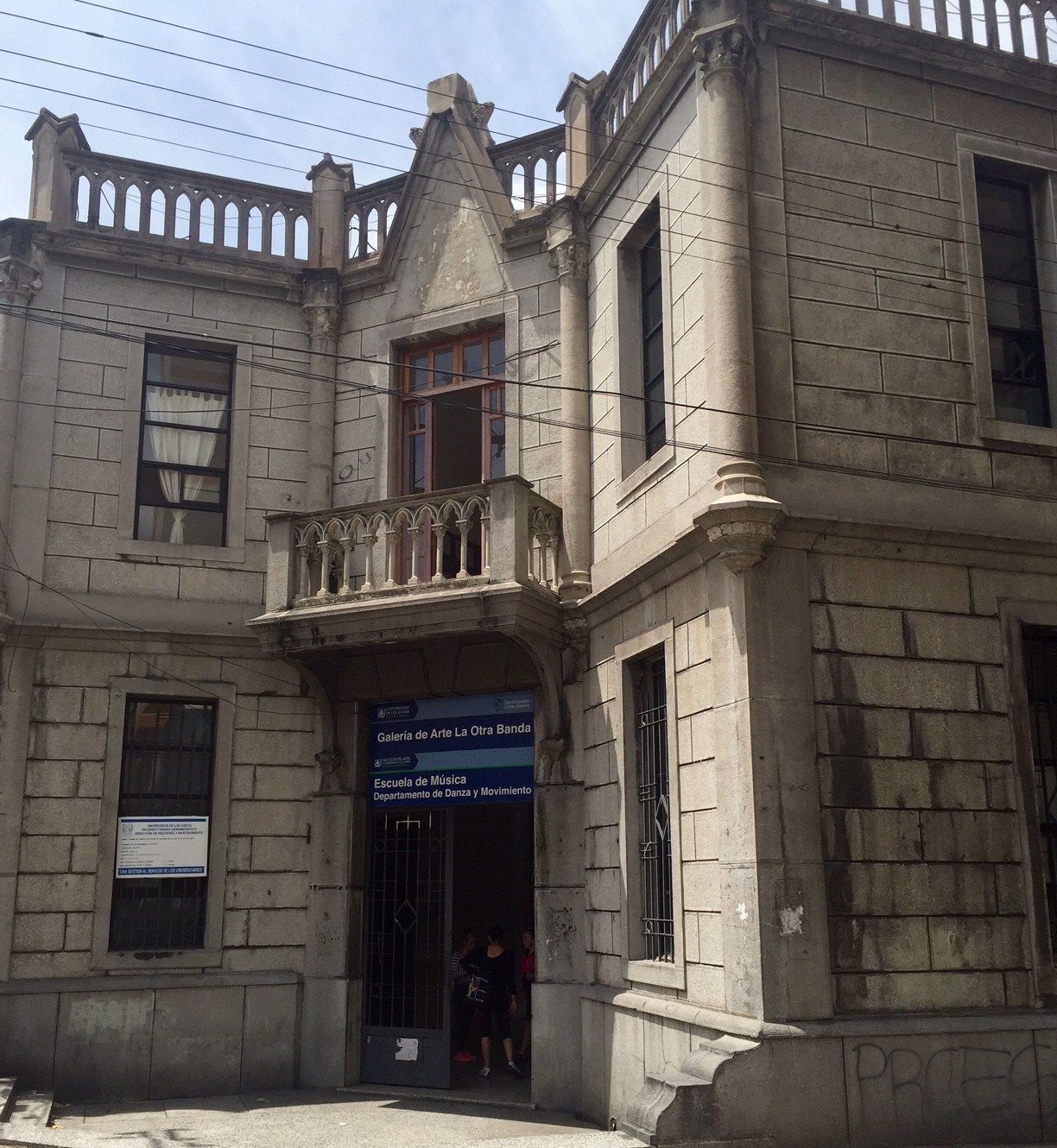 Escuela de Música y Galería de Arte La Otra Banda, Mérida, Venezuela.